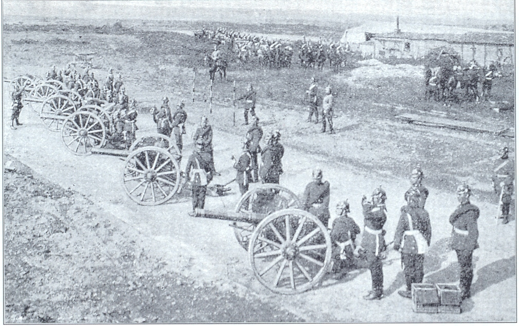 Bildunterschrift: 148. Feldbatterie in Feuerstellung (Protzen zum Aufprotzen heranfahrend, Munitionswagen bereits abgefahren). Nach einer Photographie von Friedr. Oswald Kluge, Aachen.